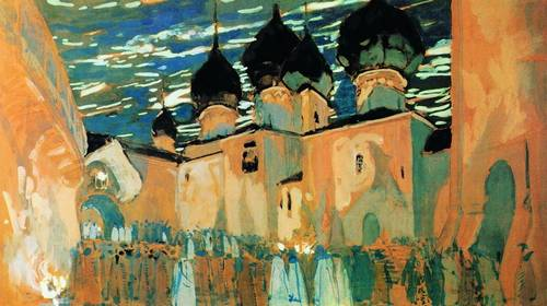 Вече в псковском кремле. 1901 Эскиз декорации к опере Н.А. Римского-Корсакова "Псковитянка" Картон, акварель, гуашь. 53 x 93 см Государственная Третьяковская галерея